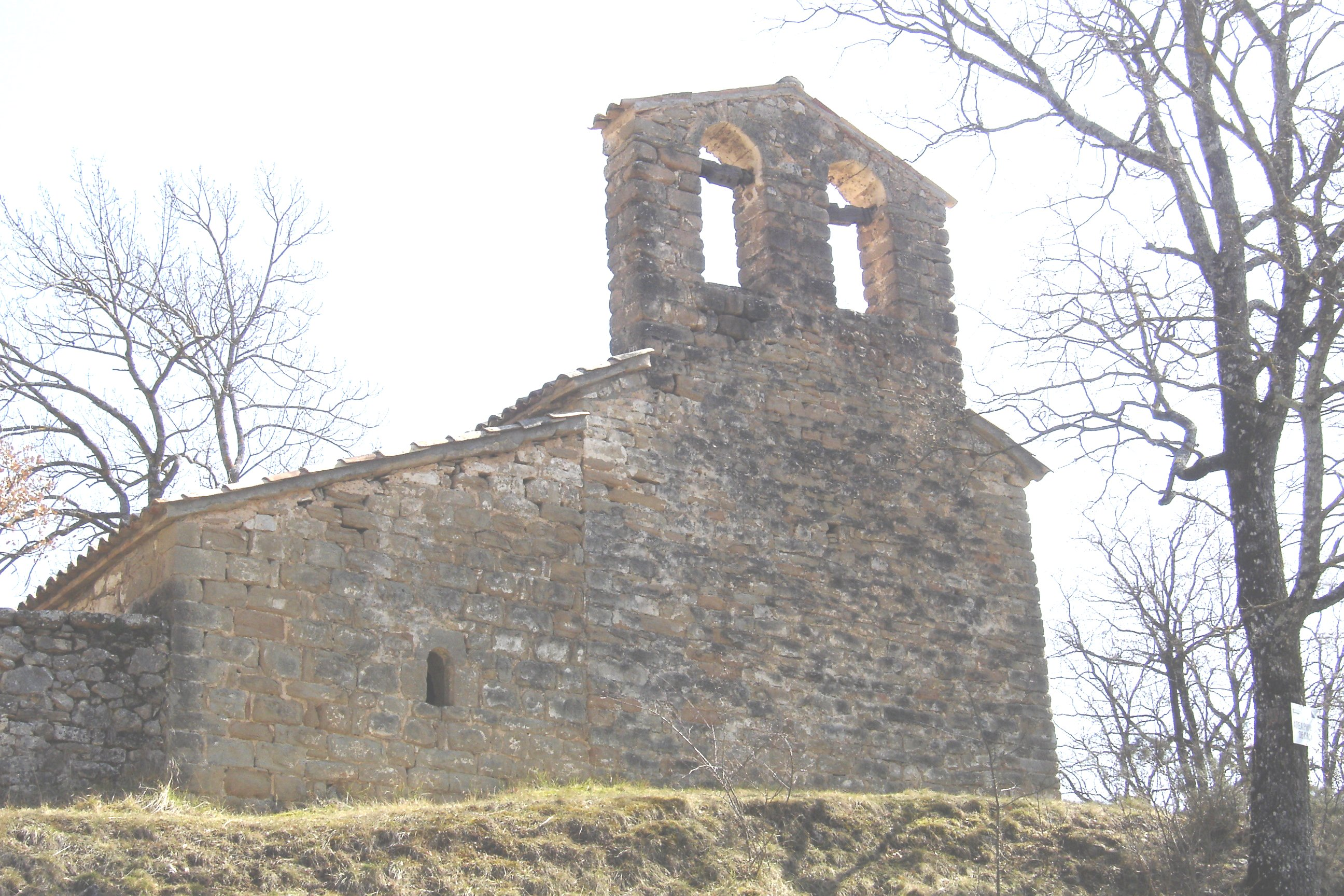 Façana oest de l'ermita de Sant Lleïr de Casabella, al municipi de La Coma i la Pedra, a la Vall de Lord (Solsonès).